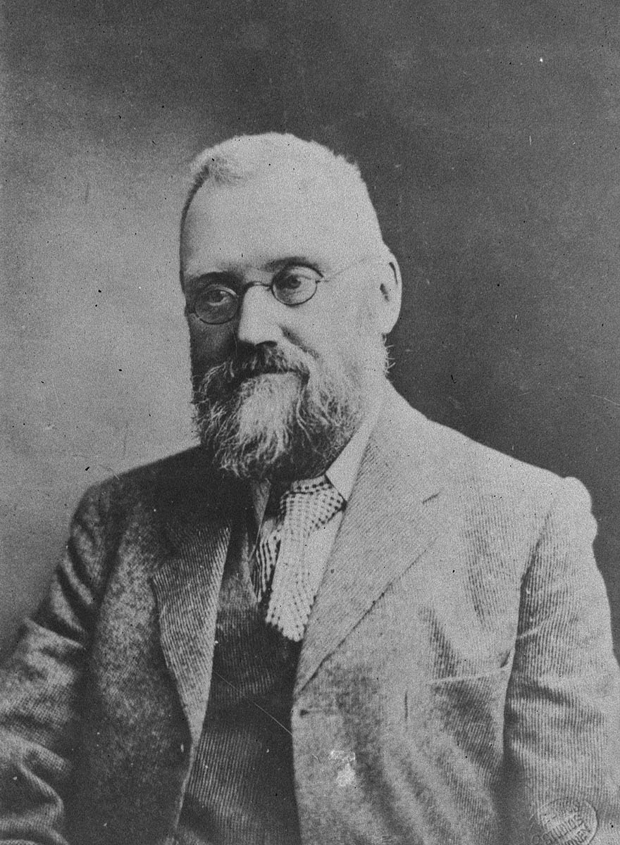 William Farrer